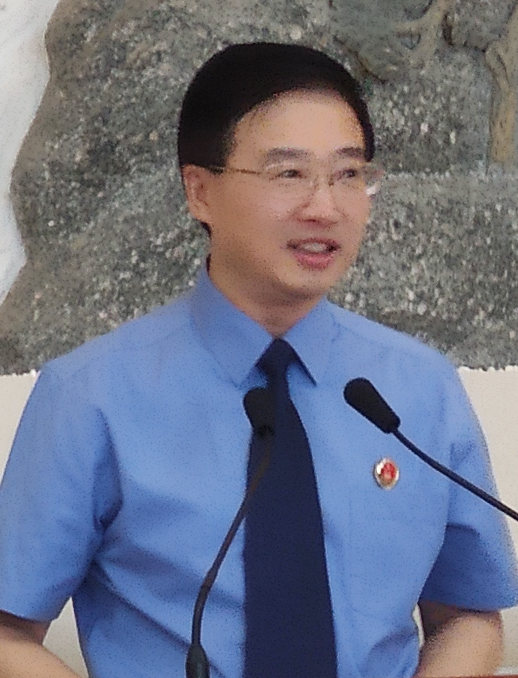 最高检副检察长童建明